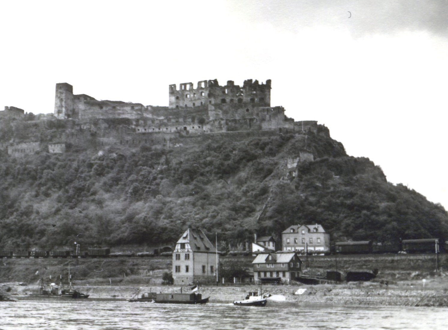 Blick auf Burg Rheinfels im Juli 1938, Ausschnitt